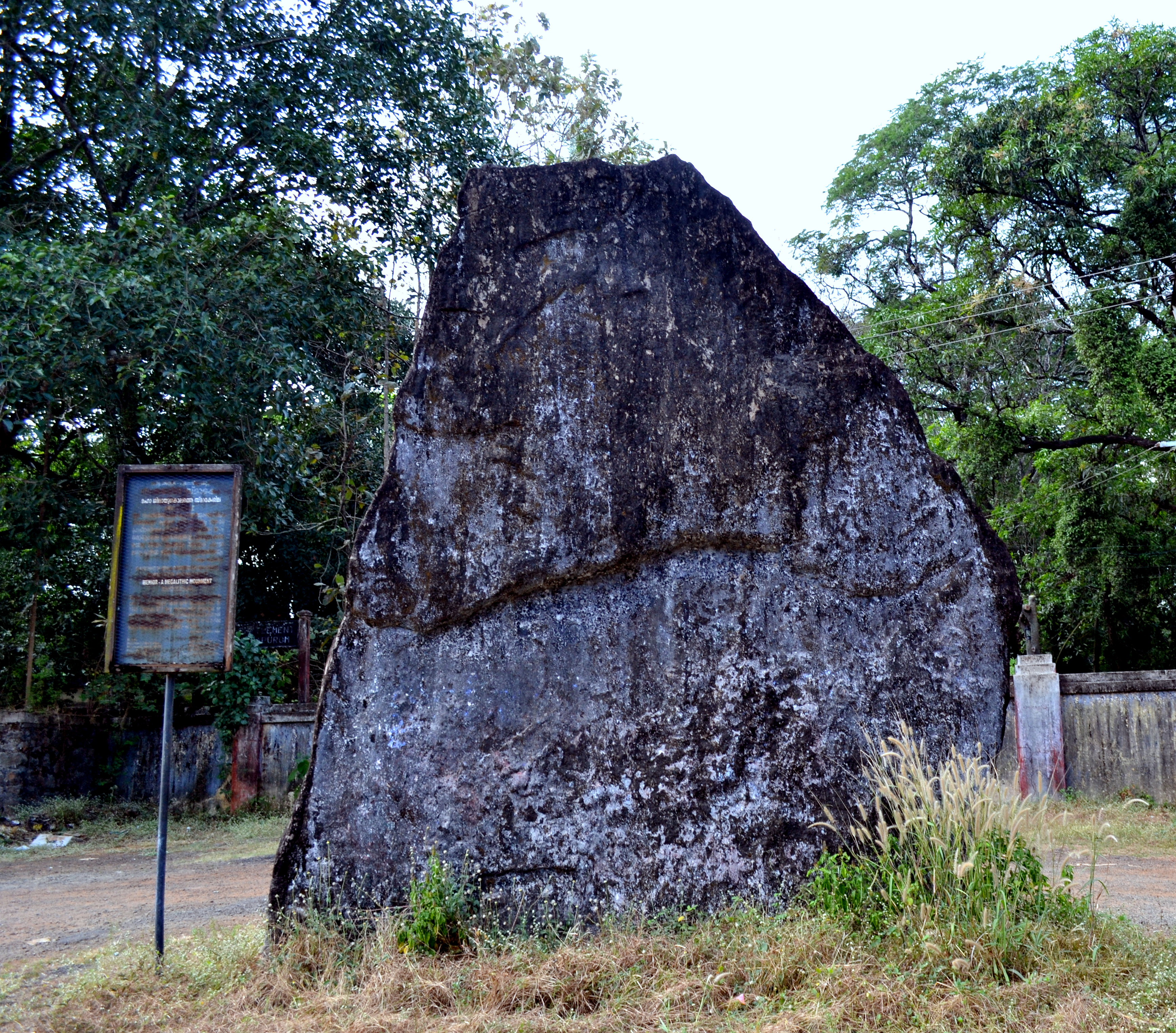 തൃശ്ശൂർ രാമവർമ്മപുരത്തുള്ള മഹാശിലായുഗ അവശിഷ്ടം